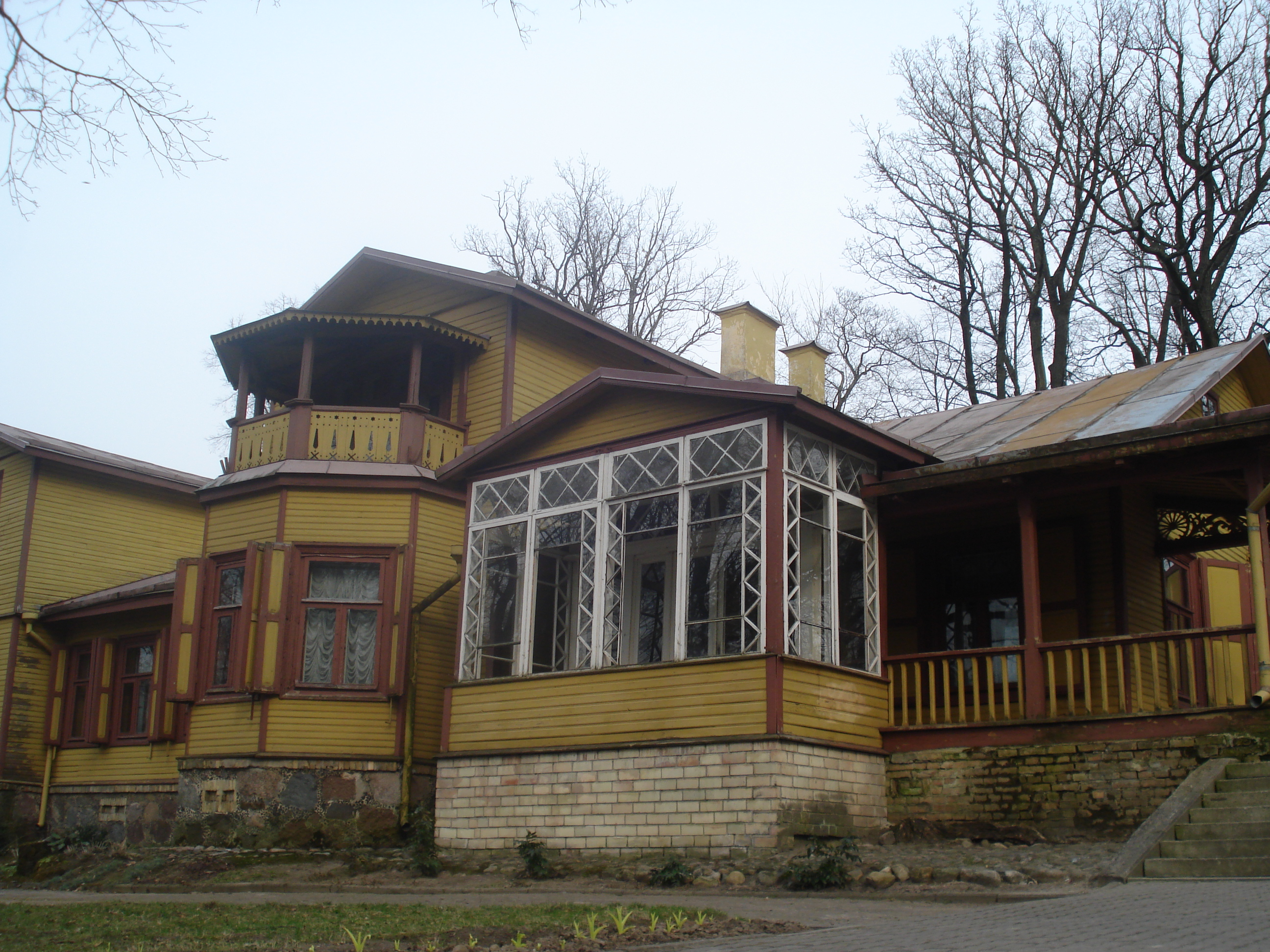 Alexander Pushkin Museum in Vilnius. Literatūrinis Aleksandro Puškino muziejus. Subačiaus g. 124